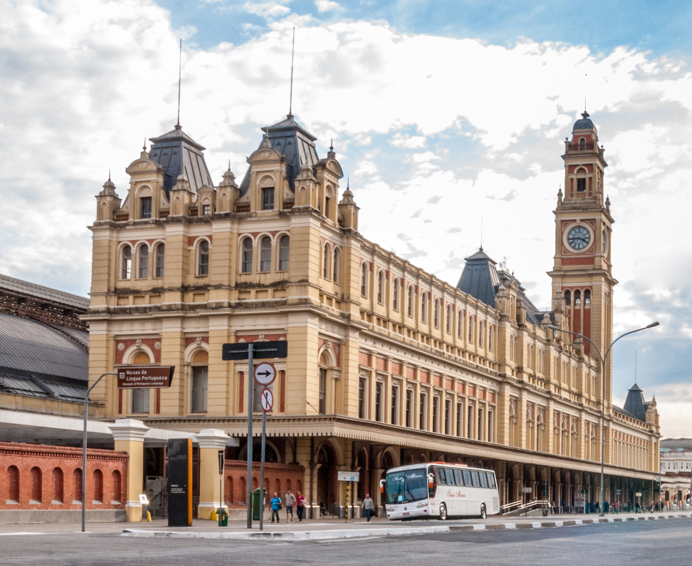 Estación de Luz, São Paulo